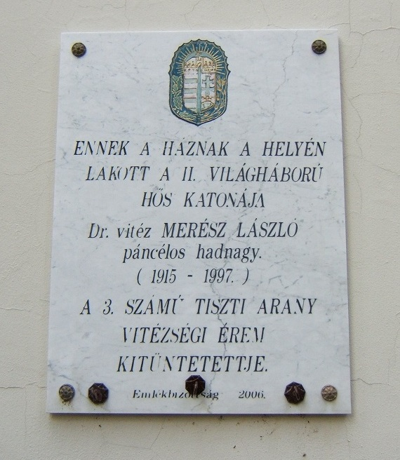 Kaposvár, Merész László emléktáblája